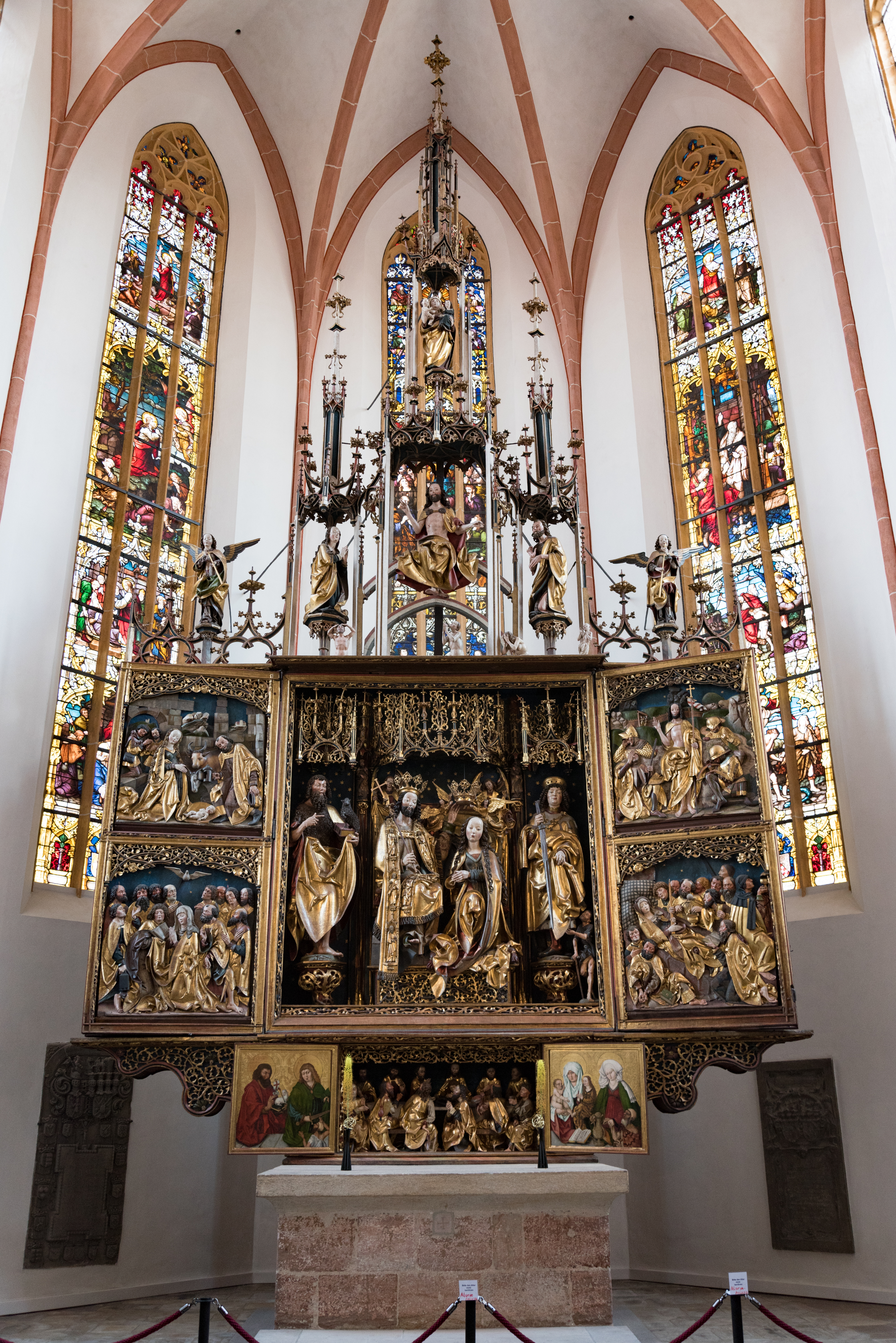 Schwabach, Martin-Luther-Platz 2, Ev. Stadtpfarrkirche